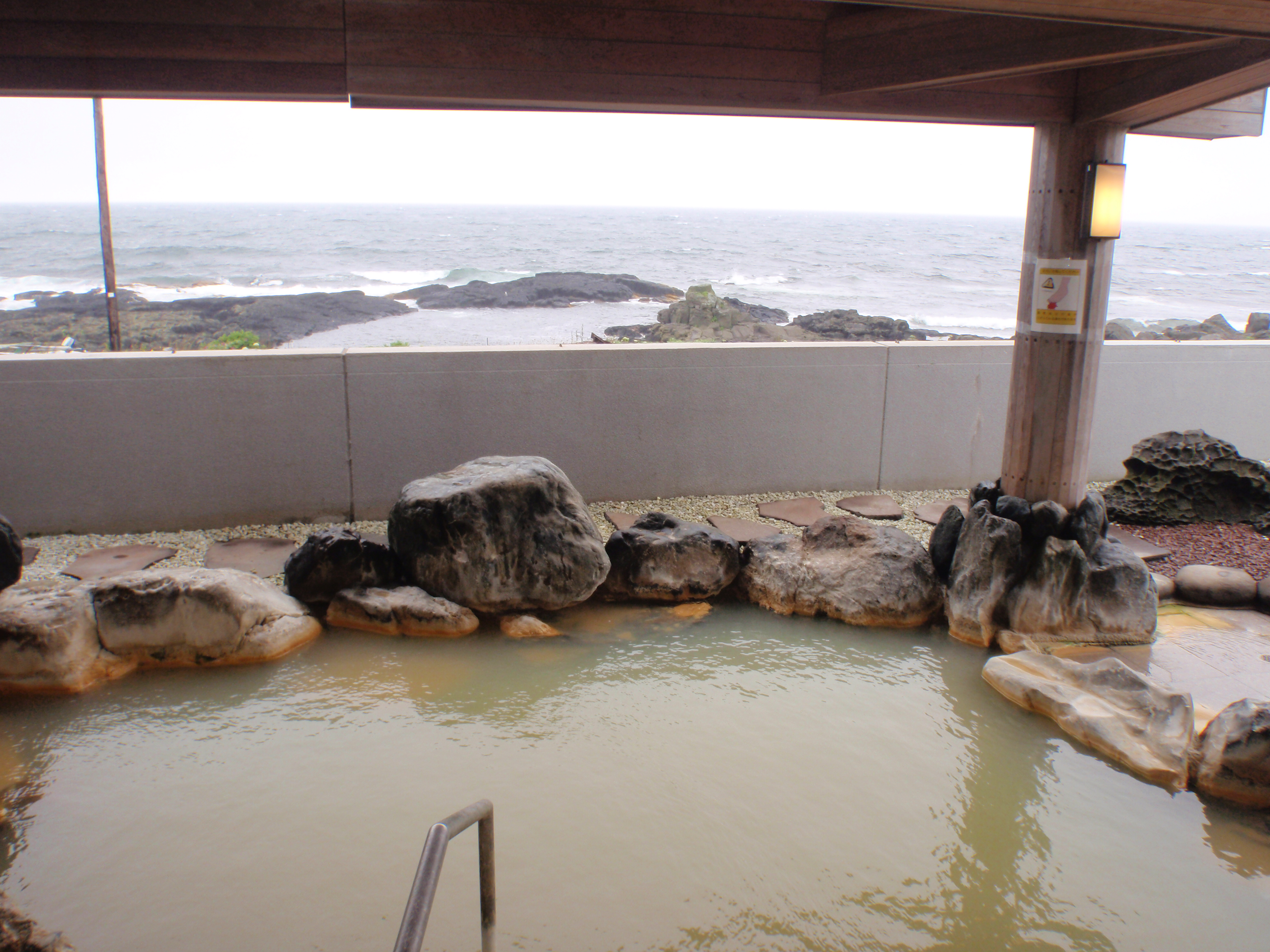 利尻ふれあい温泉露天風呂